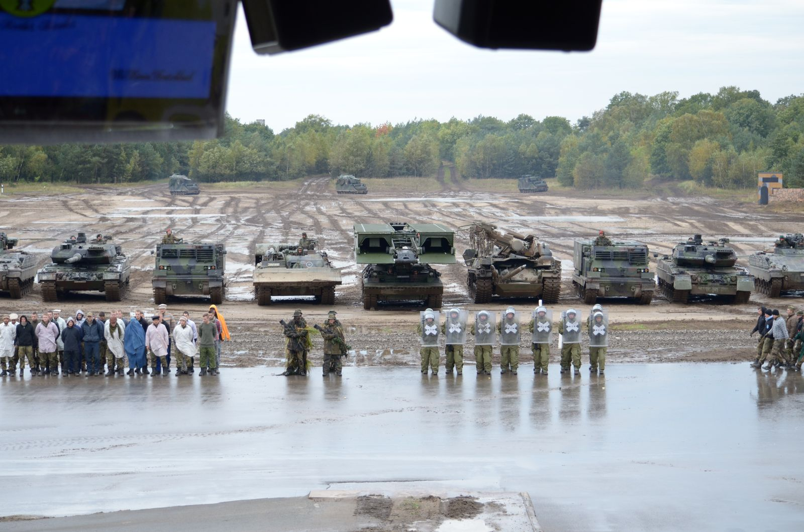 Eindrücke von der ILÜ 2012 der BW 24.09.2012)